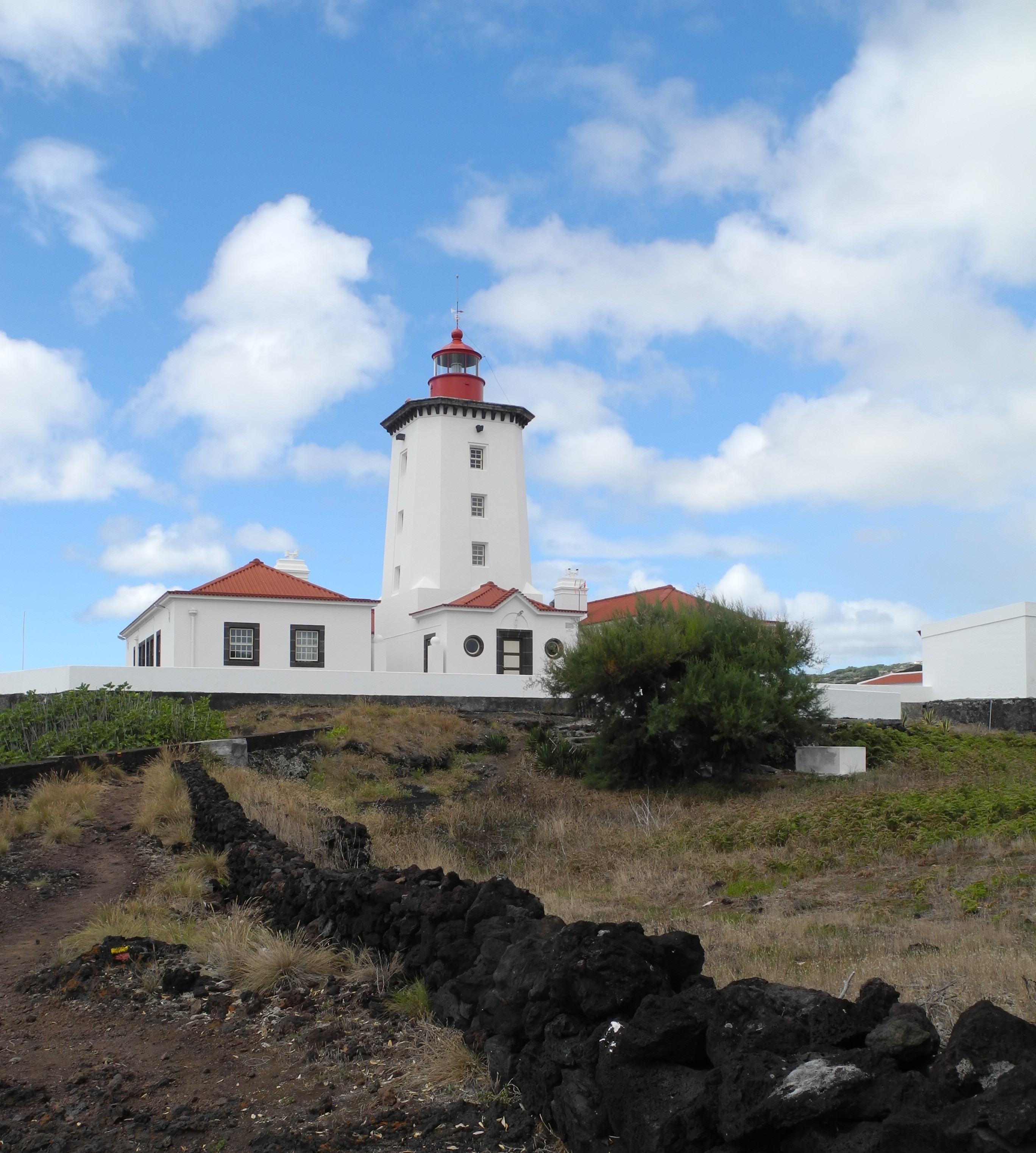 Mantenha - Leuchtturm, Ponta da Ilha